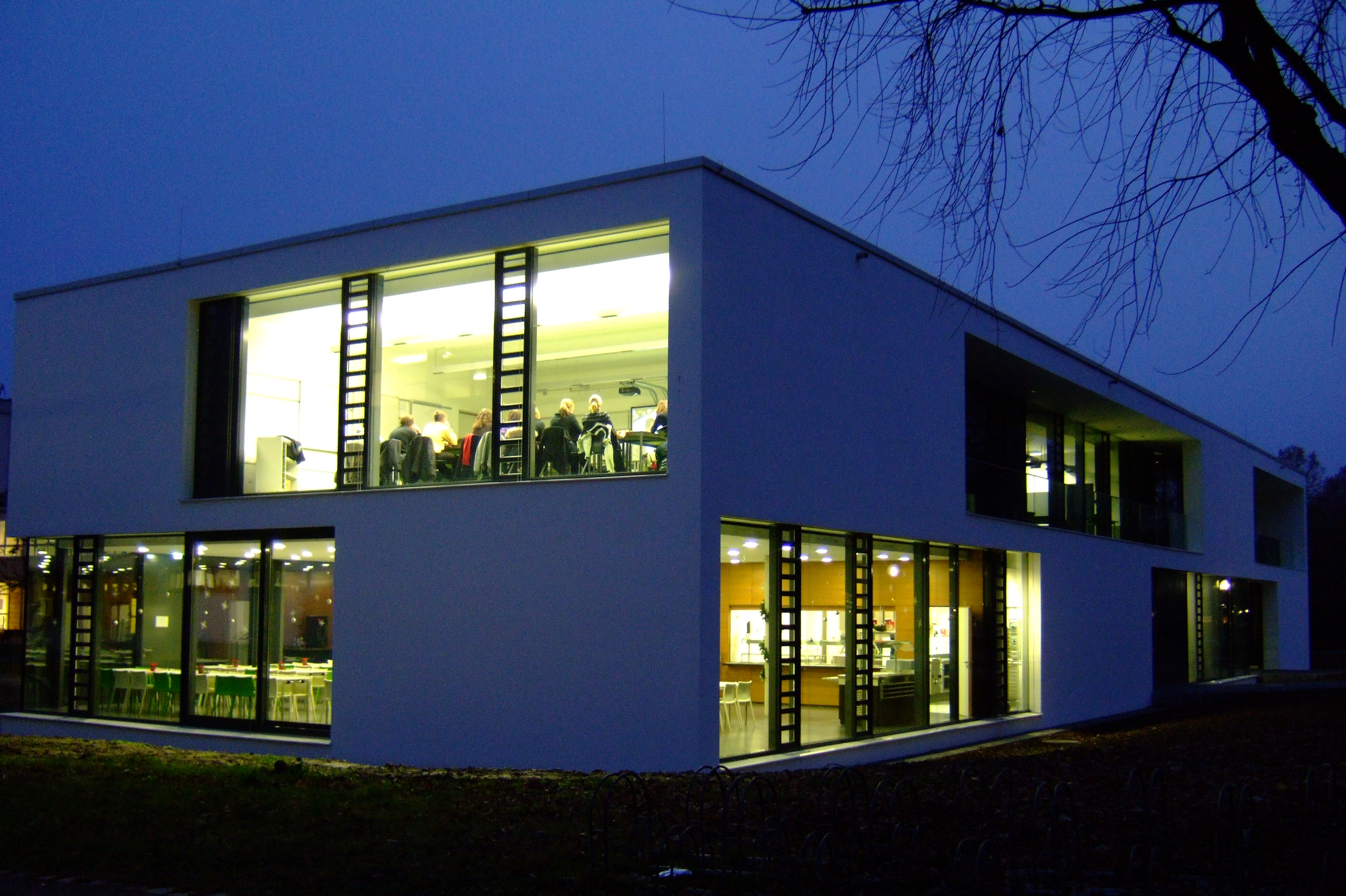 Albert-Schweitzer-Gymnasium (Neubau von 2008) Neckarsulm, Deutschland